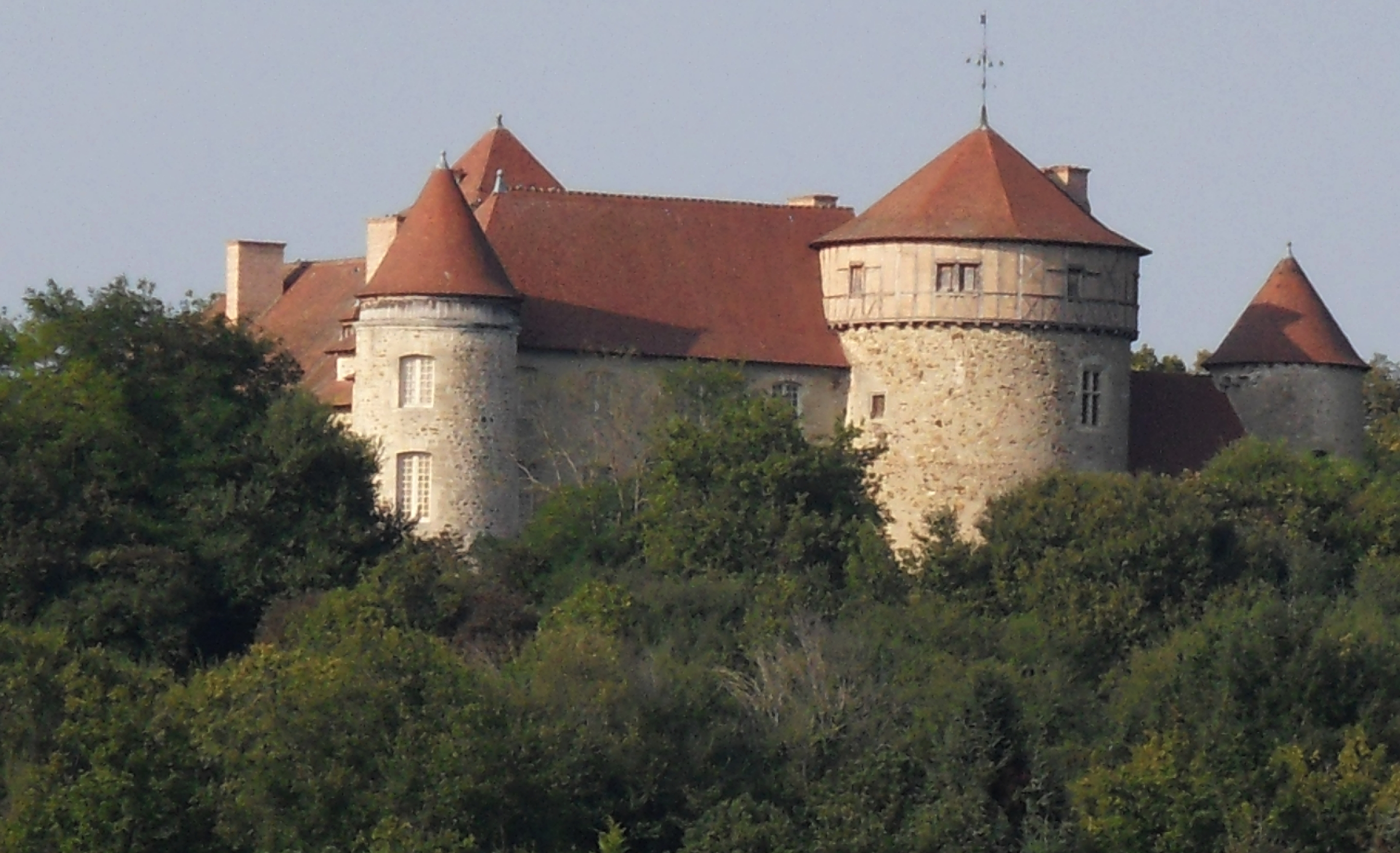 Château de Chaussins, (Inscrit, 1980)